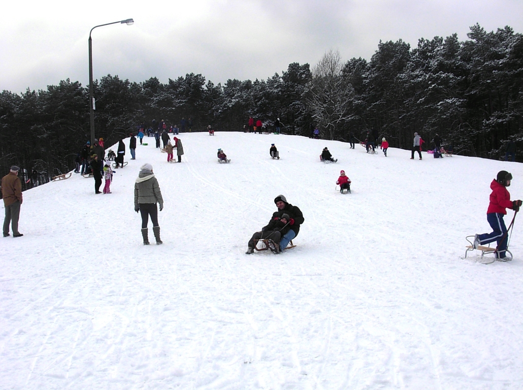 Górka saneczkowa na osiedlu Kapuściska w Bydgoszczy